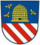 Blazon of Niederbüren, Canton of St. Gallen - Blazono de Niederbüren, Kantono de Sankt-Galo